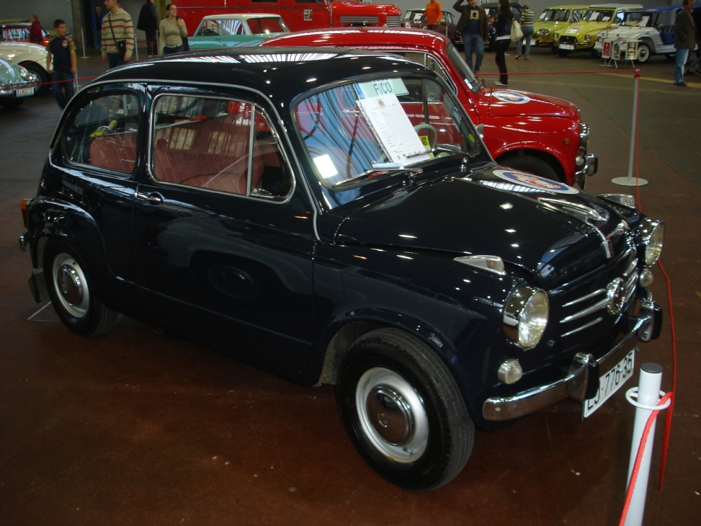 Zastava 750 (Fičo) on the 1. Oldtimer festival Codelli in Ljubljana, Slovenia